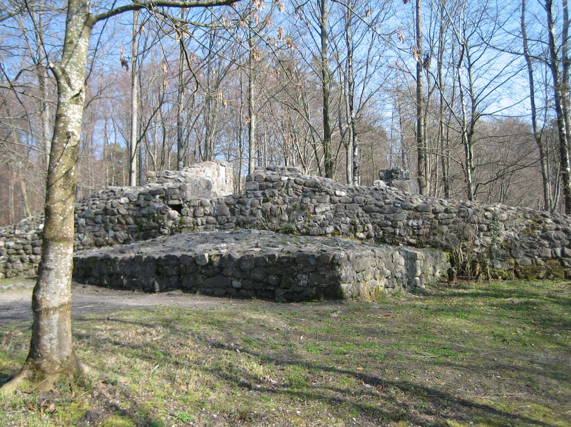 Ruine Wulp